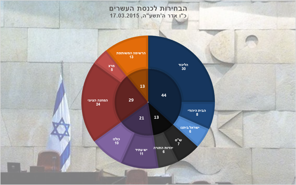 תוצאות הבחירות לכנסת העשרים